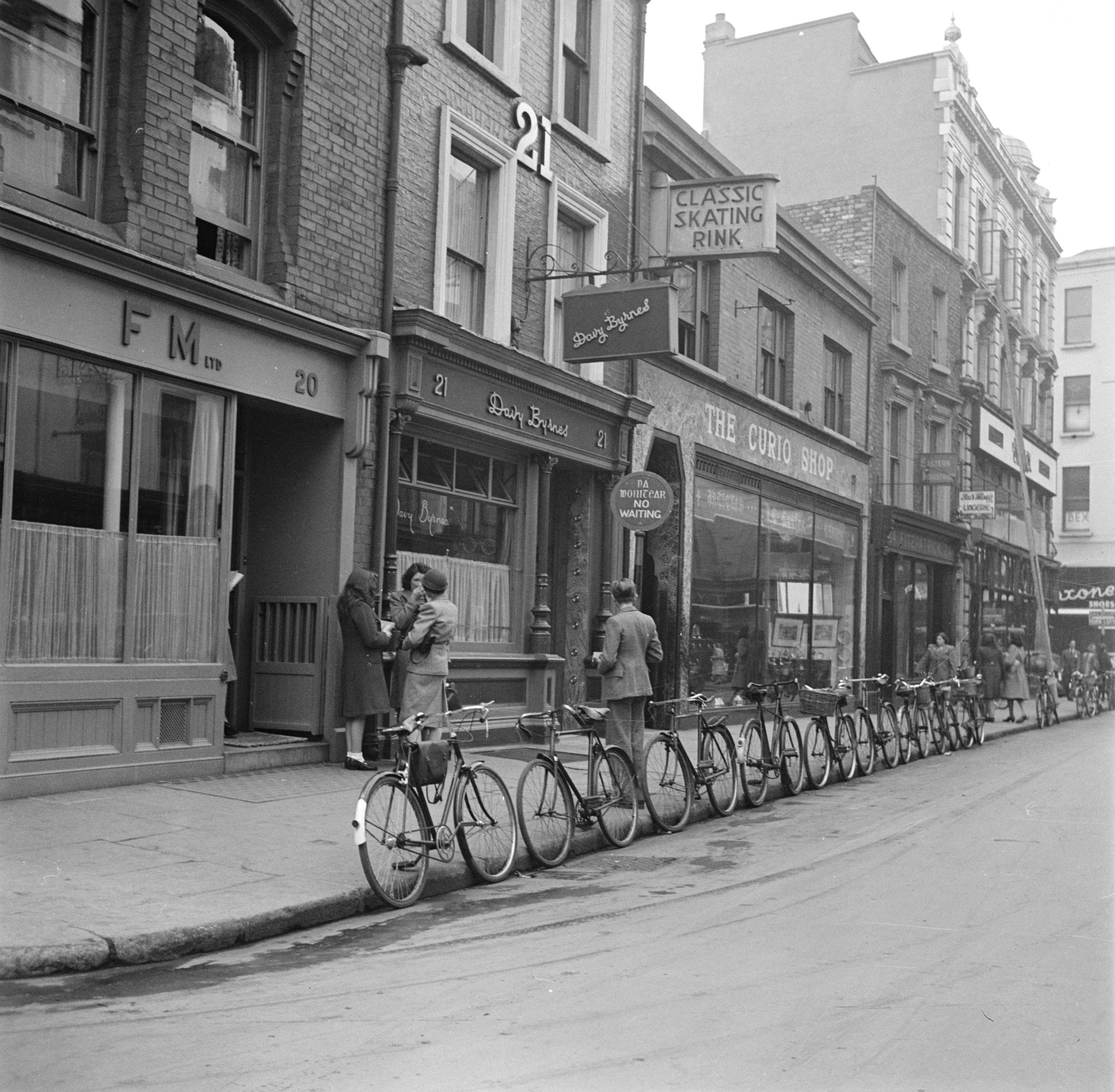 Collectie / Archief : Fotocollectie Van de Poll Reportage / Serie : Dublin Beschrijving : Fietsen staan tegen de stoeprand geparkeerd in een straat in Dublin Datum : 1946 Locatie : Dublin, Ierland Trefwoorden : fietsen, straatbeelden Fotograaf : Poll, Willem van de Auteursrechthebbende : Nationaal Archief Materiaalsoort : Glasnegatief Nummer archiefinventaris : bekijk toegang 2.24.14.02 Bestanddeelnummer : 191-0870